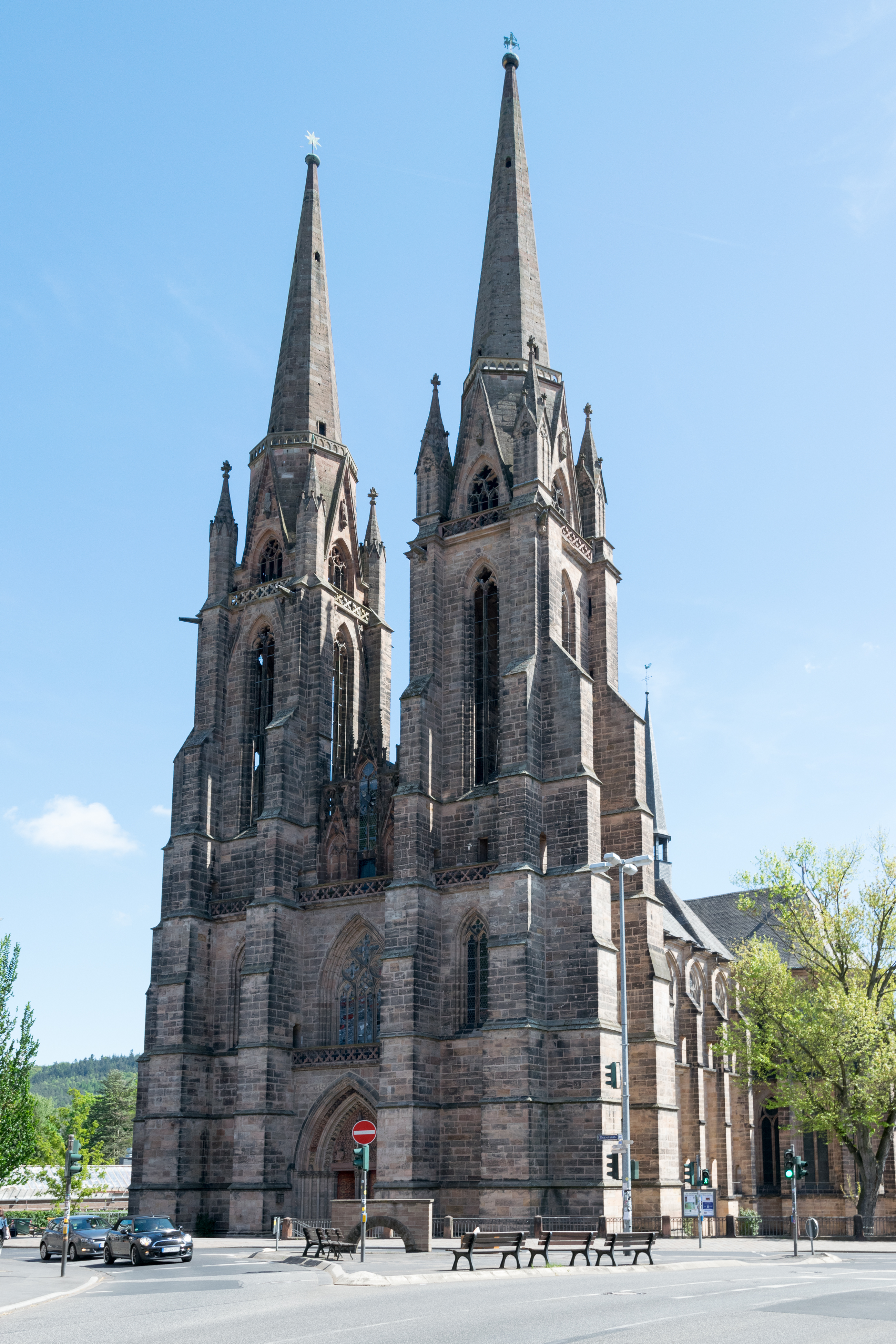 Die Elisabethkirche in Marburg